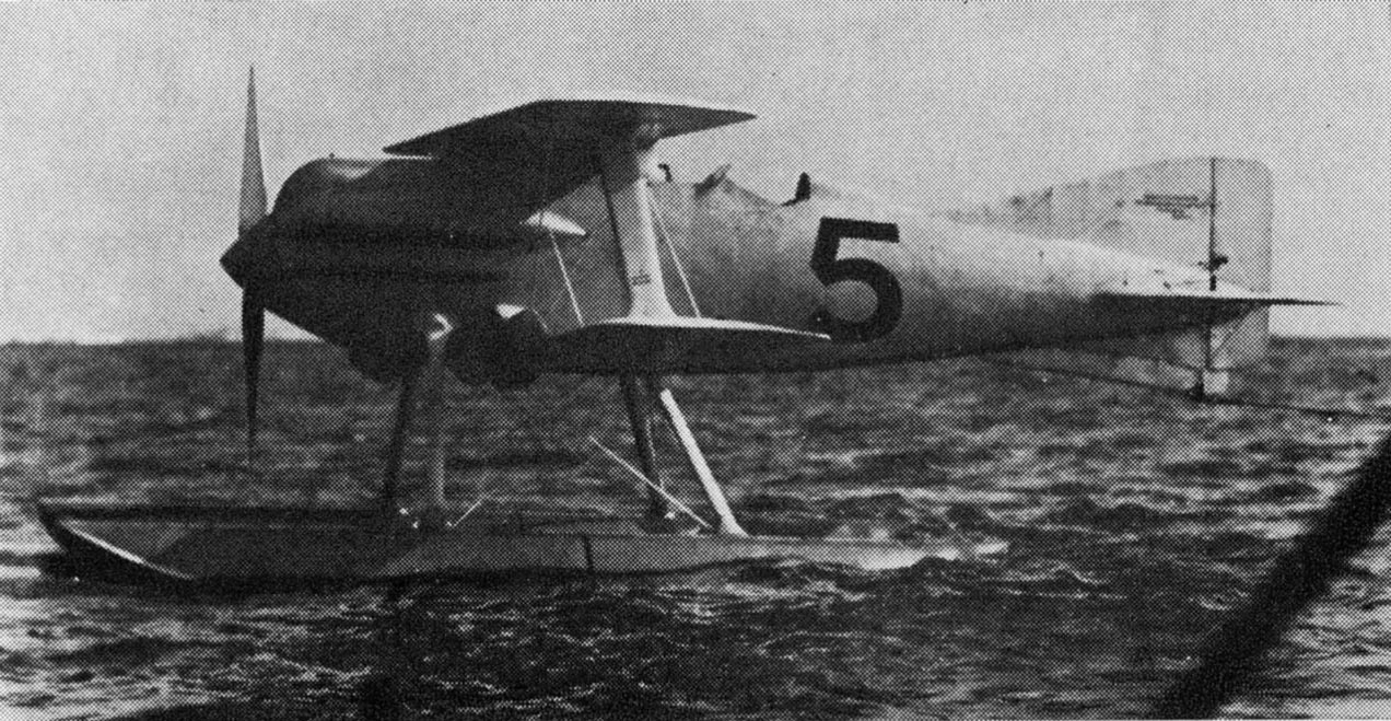 Gloster IIA